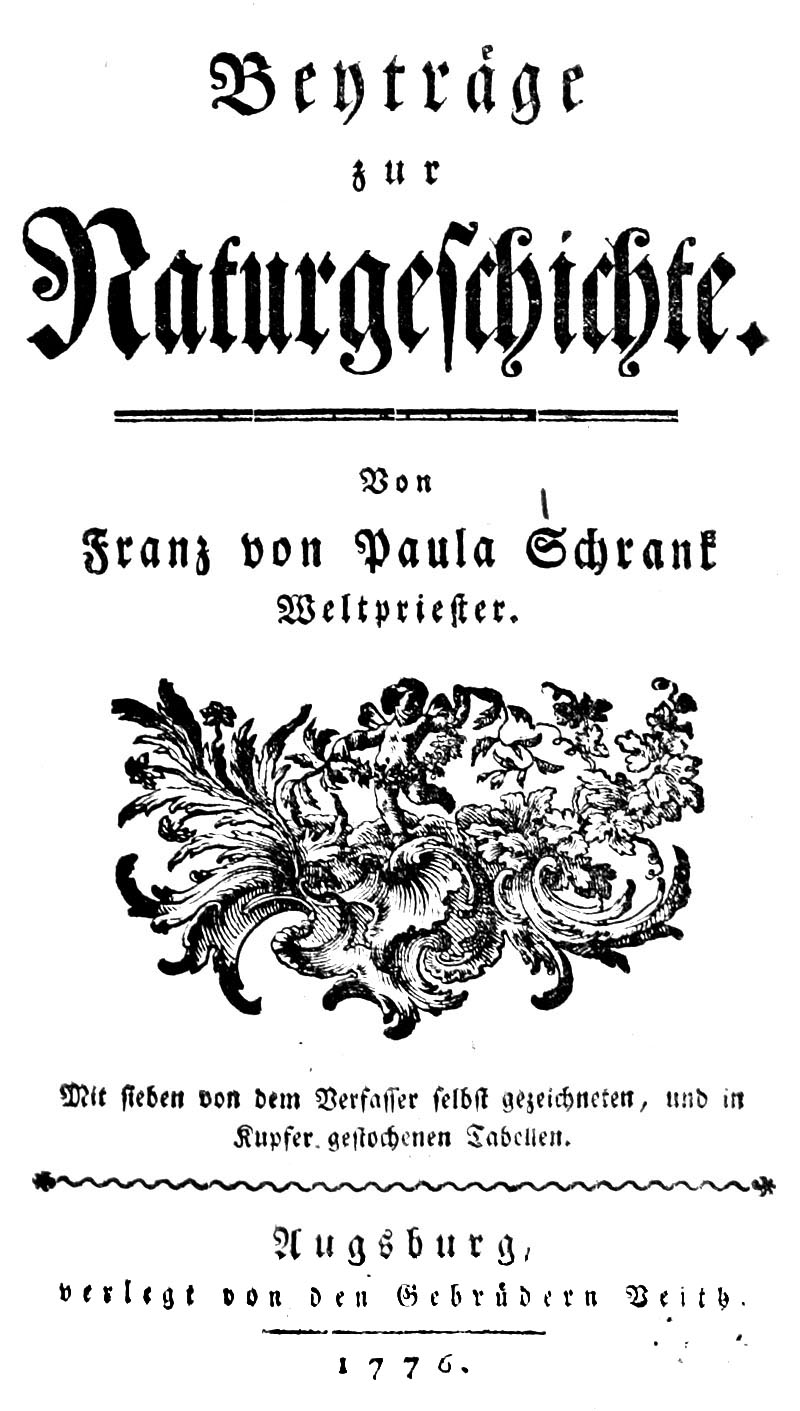 Titelseite des Buches "Beiträge zur Naturgeschichte" von Franz von Paula Schrank